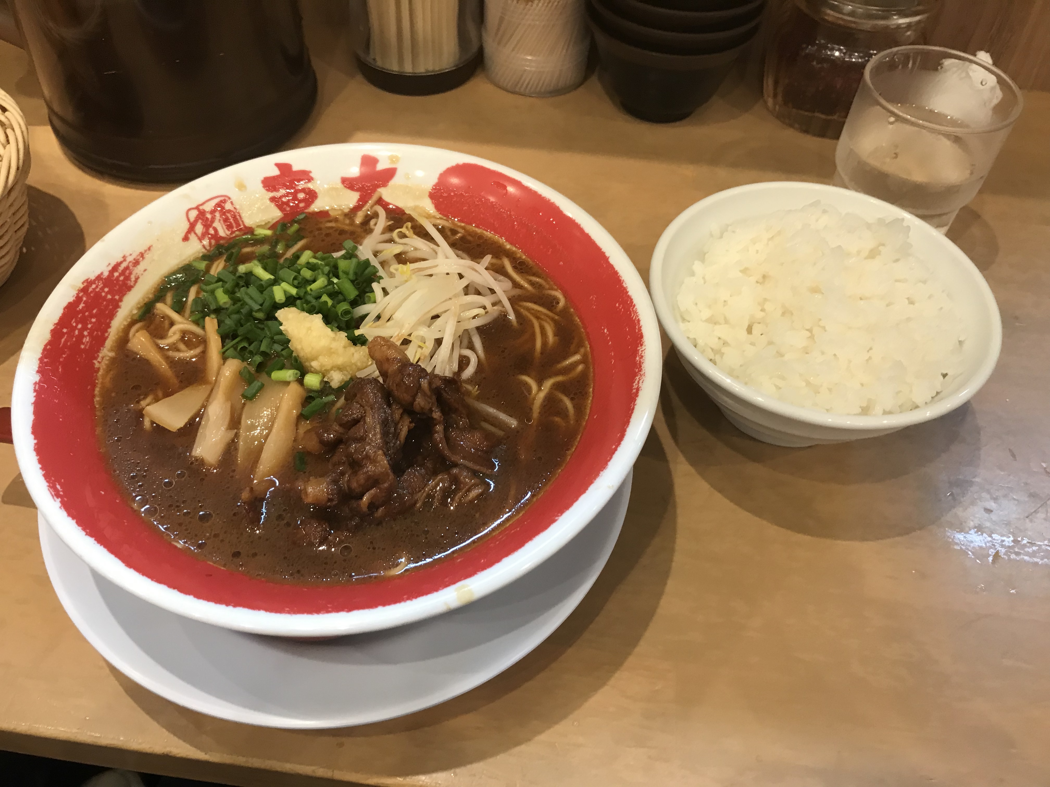 東大ラーメン十三店 徳島ラーメンとご飯セット